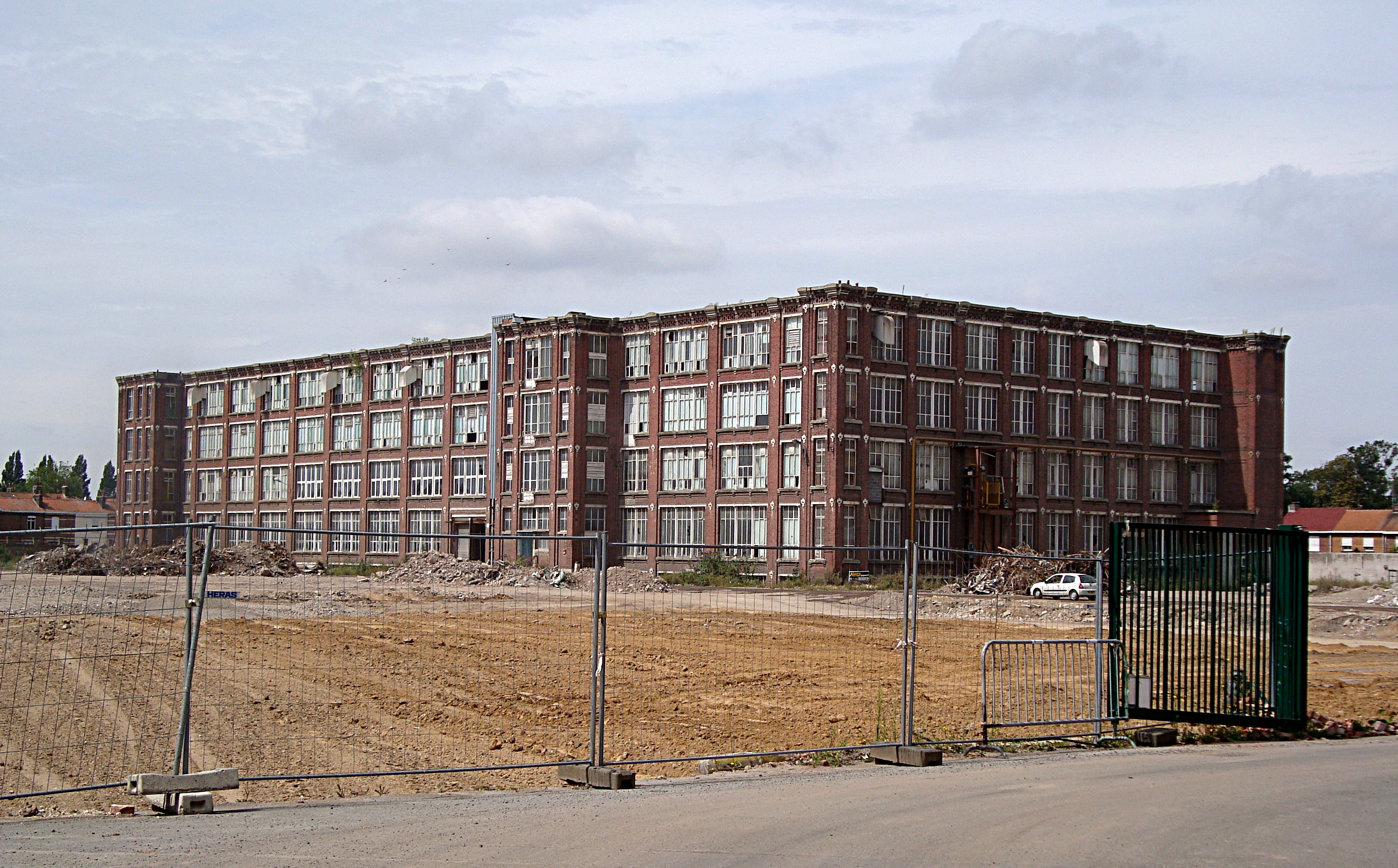 La friche Thiriez en cours de réhabilitation à Loos (Nord).